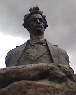 Busto de Juan Montalvo, por Luis Mideros, parque El Ejido, Quito